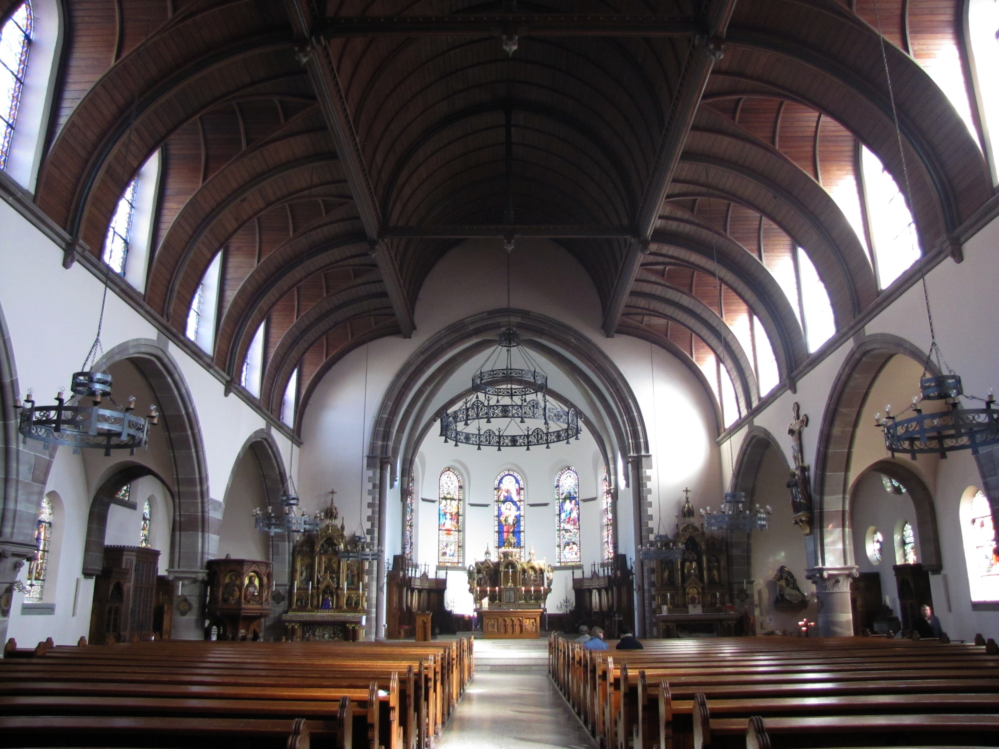 Alsace, Bas-Rhin, Église catholique Saint-Joseph (1900) de Strasbourg-Koenigshoffen: Vue intérieure de la nef vers le chœur.